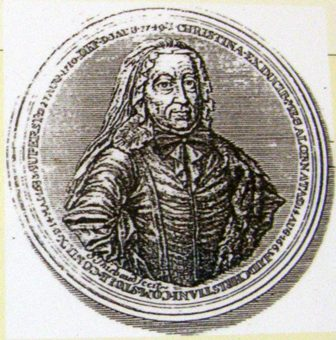 Gräfin Christine zu Stolberg-Gedern, geb. Herzogin zu Mecklenburg-Güstrow (14. August 1663 – 3. August 1749)